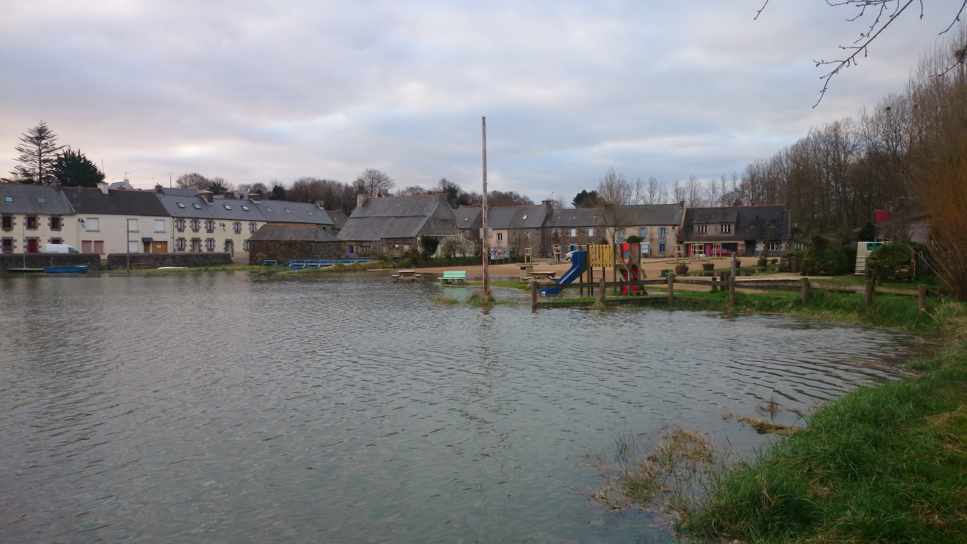 A marée haute